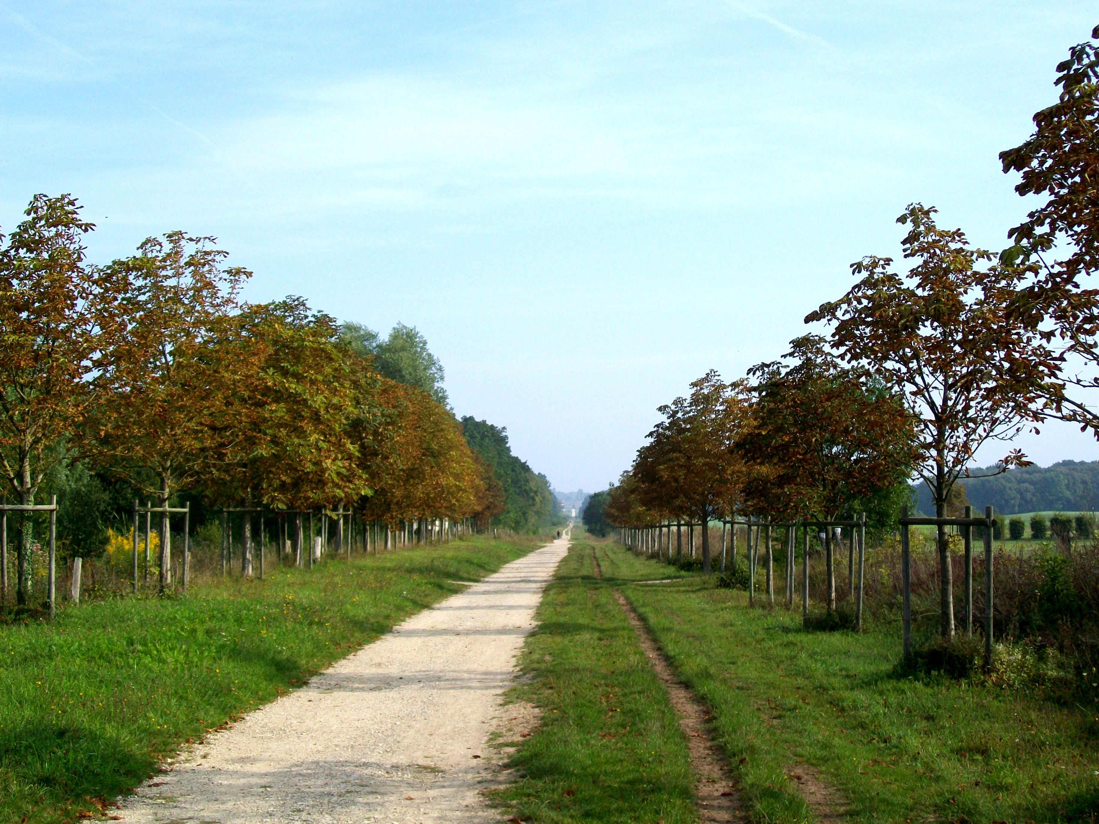 L'allée de Saint-Firmin, reliant le château de Saint-Firmin au carrefour de la table d'Apremont, dans la zone de transition entre les forêts de Chantilly et d'Halatte protégée par une ZNIEFF type 2.